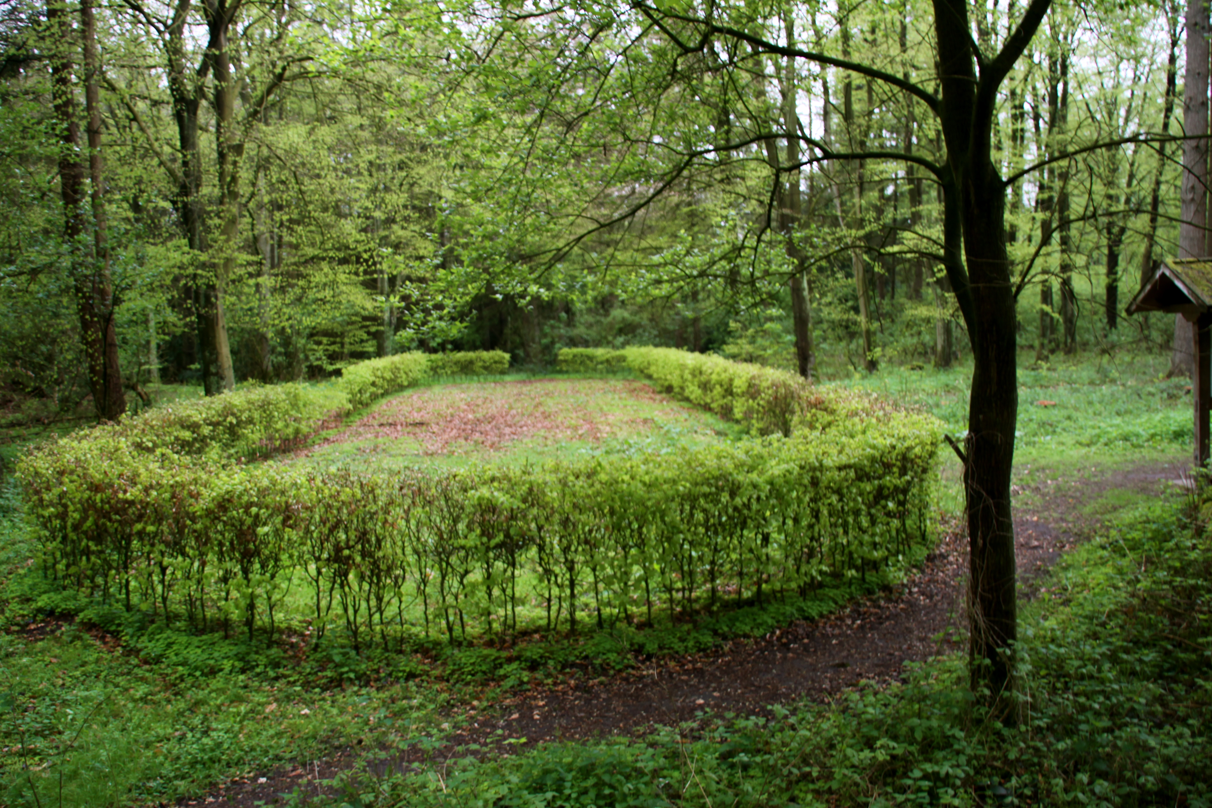 Kloster Barthe Umrisse der Klosterkirche durch Heckenpflanzung sichtbar gemacht